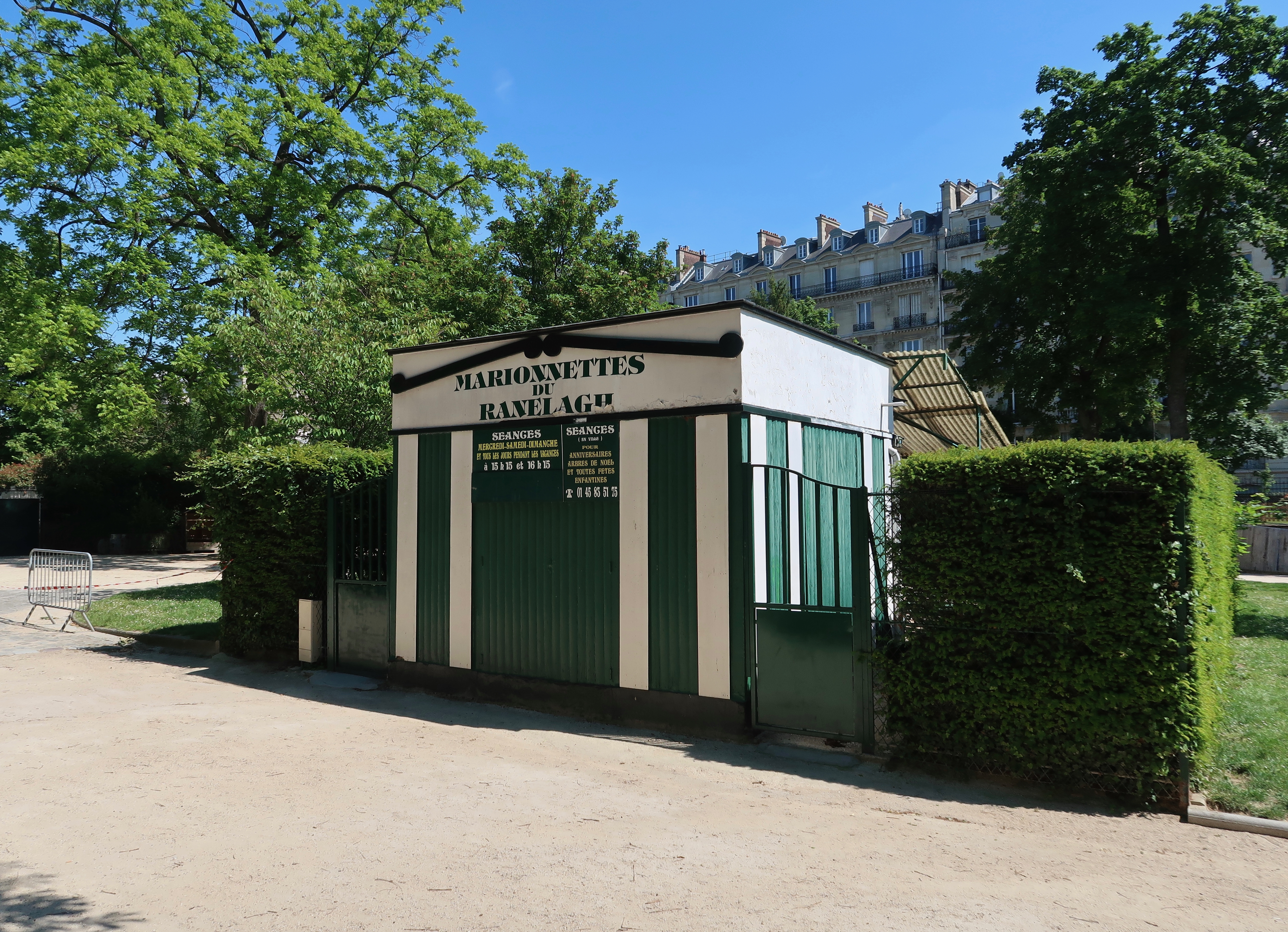 Théâtre de marionnettes du jardin du Ranelagh (Paris, 16e).